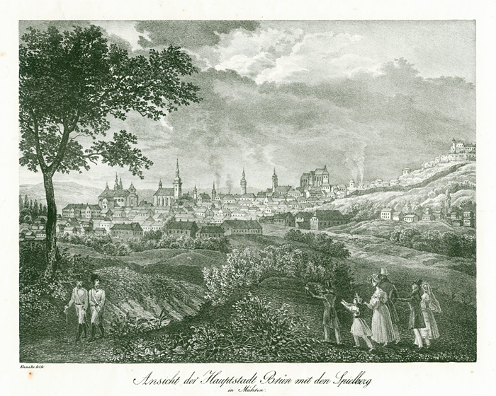 Ansicht der Hauptstadt Brün mit den Spielberg in Mähren